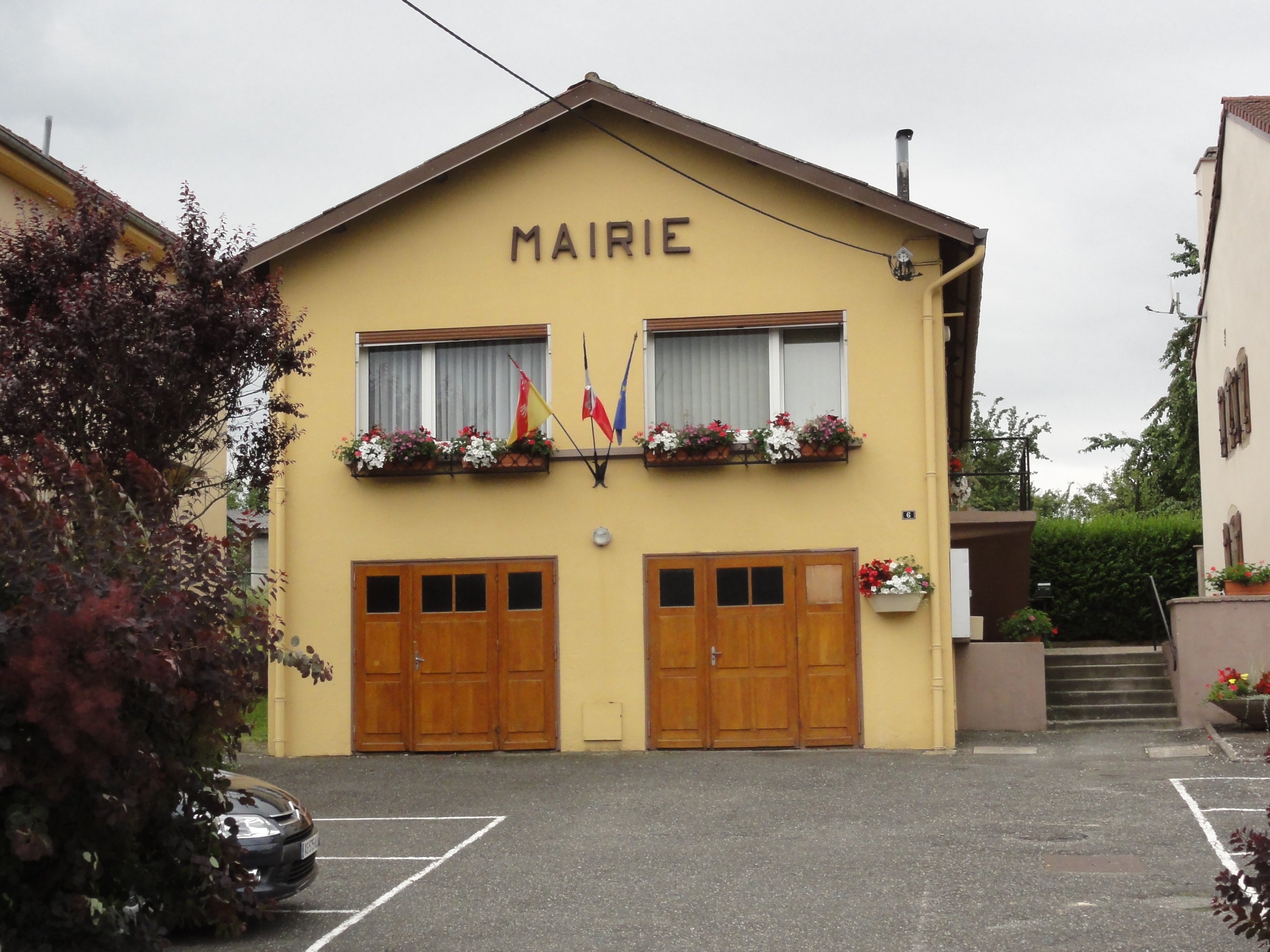 Moussey (Moselle) mairie